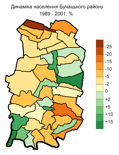 Динаміка населення Бучацького району за 1989 - 2001 рр. / Population dynamics of Bucach raion,1989-2001